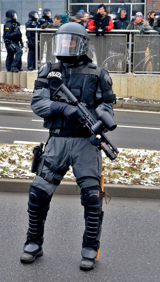 Ein SEK-Polizist mit Pepperball-Gewehr, Bambusstock und Dienstwaffe (bei einer Anti-Nazi-Demonstration/-Blockade auf der Bergstraße in Dresden)